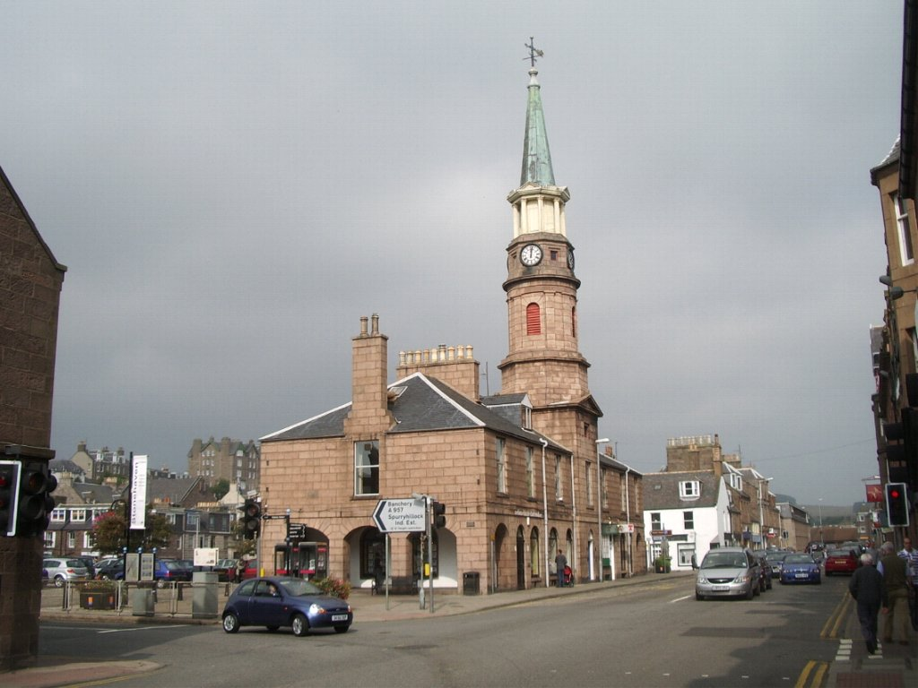 Market Square, Stonehaven